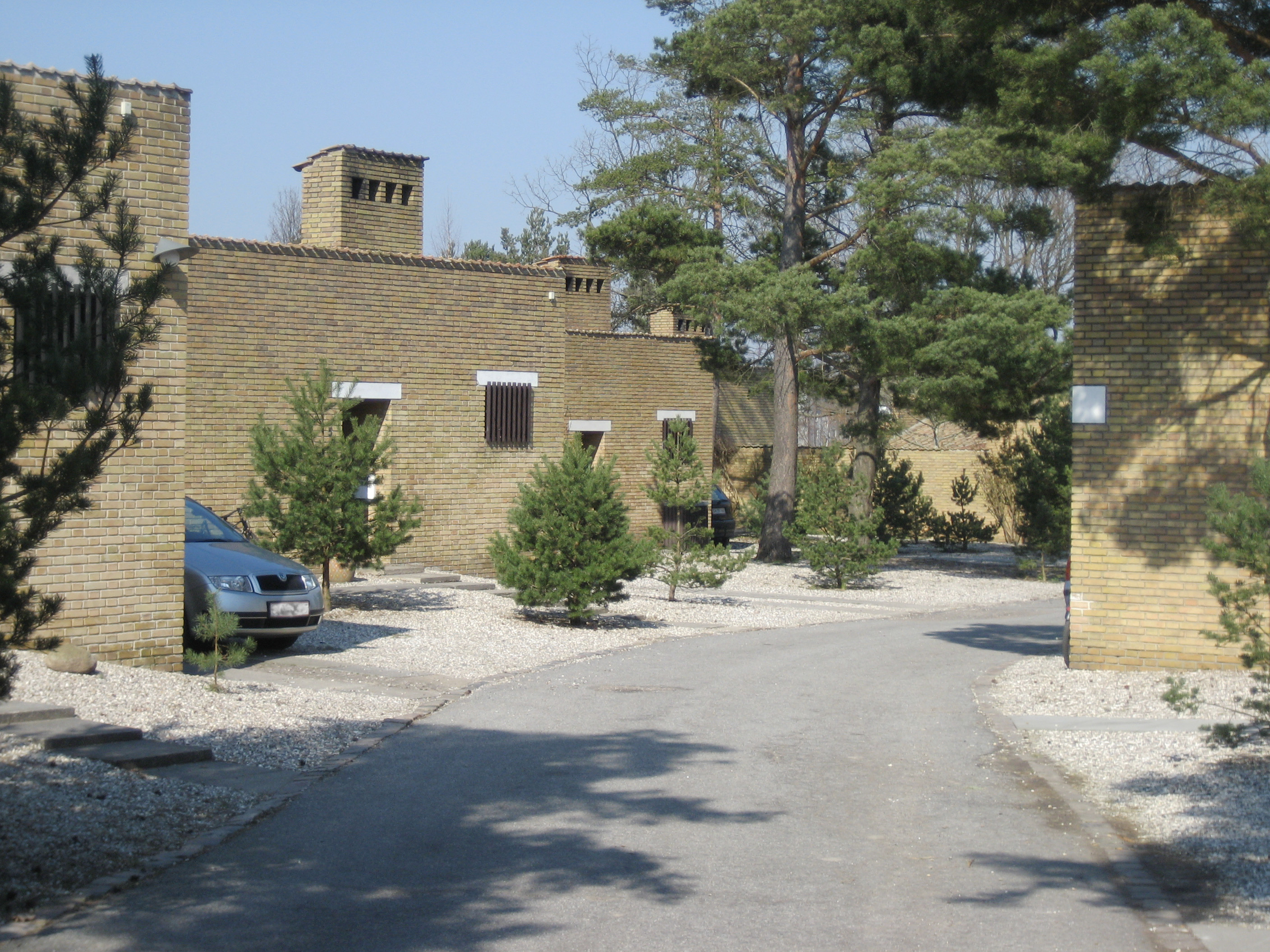 Romerhusene, Helsingør